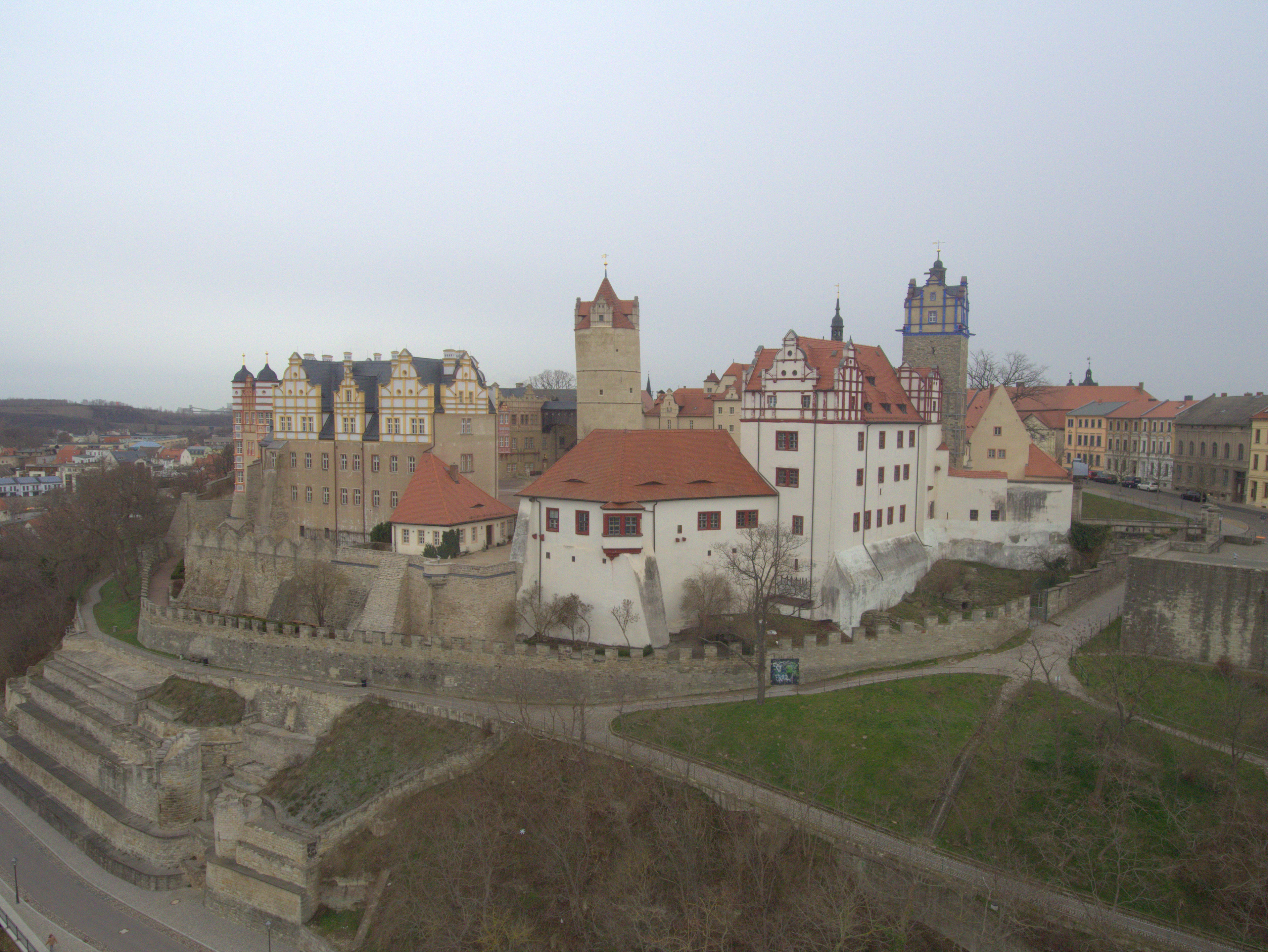 Schloss Bernburg Luftbild